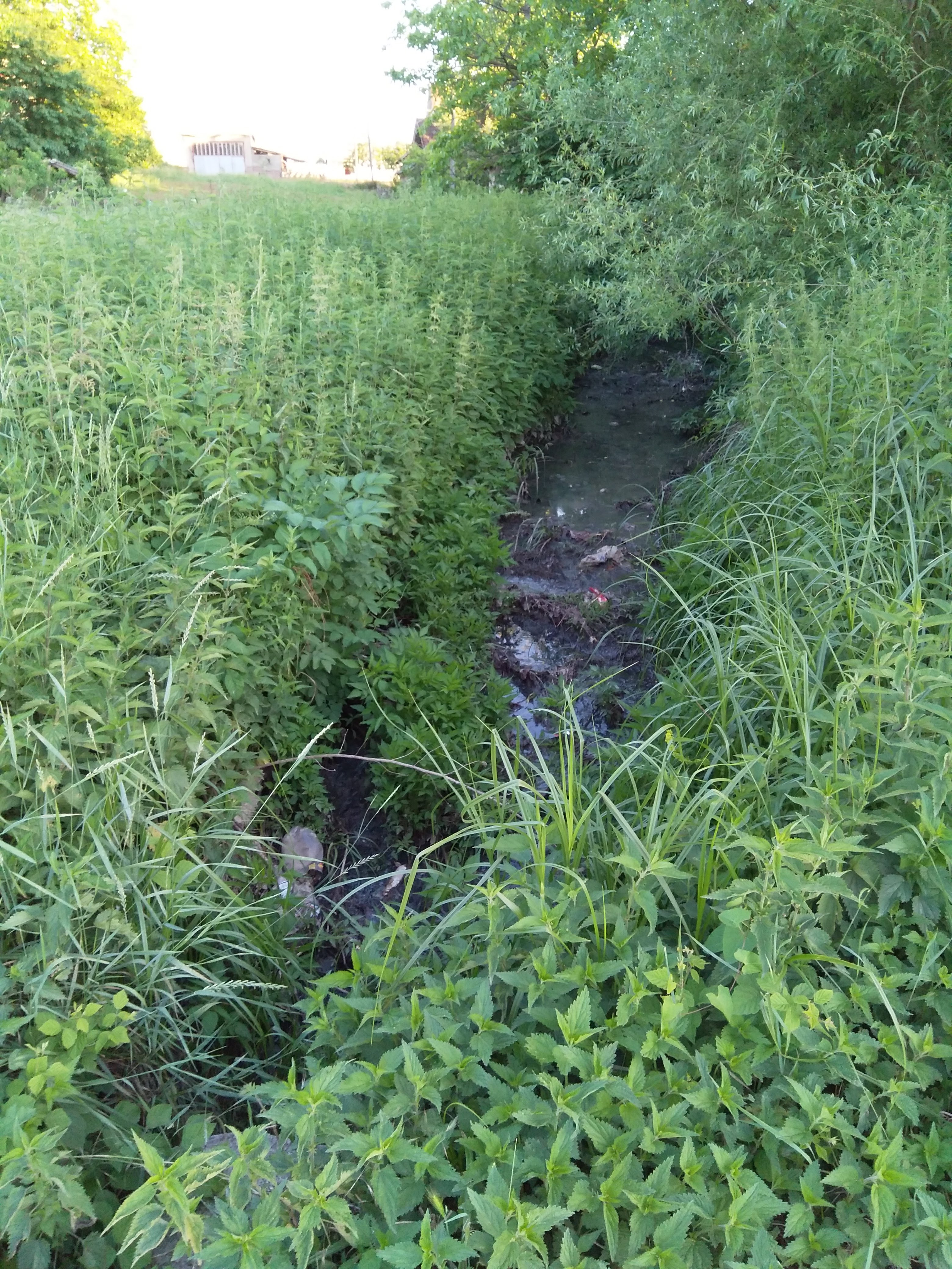 Слика Мамутовог потока у Поцерском Причиновићу